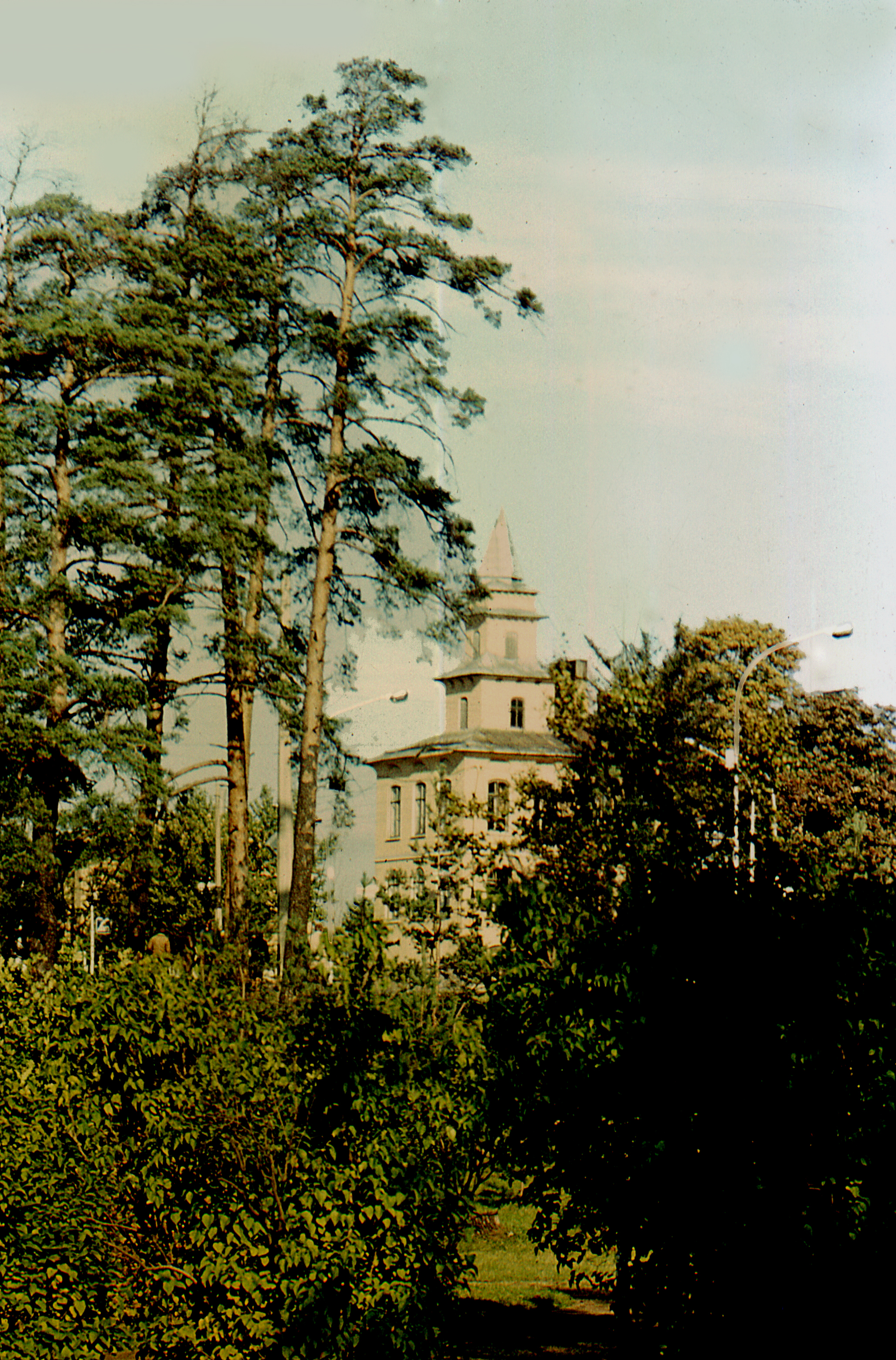 Дом Бадмаева.Поклонная гора.Петербург. Уничтожен при проведении дорожных работ.